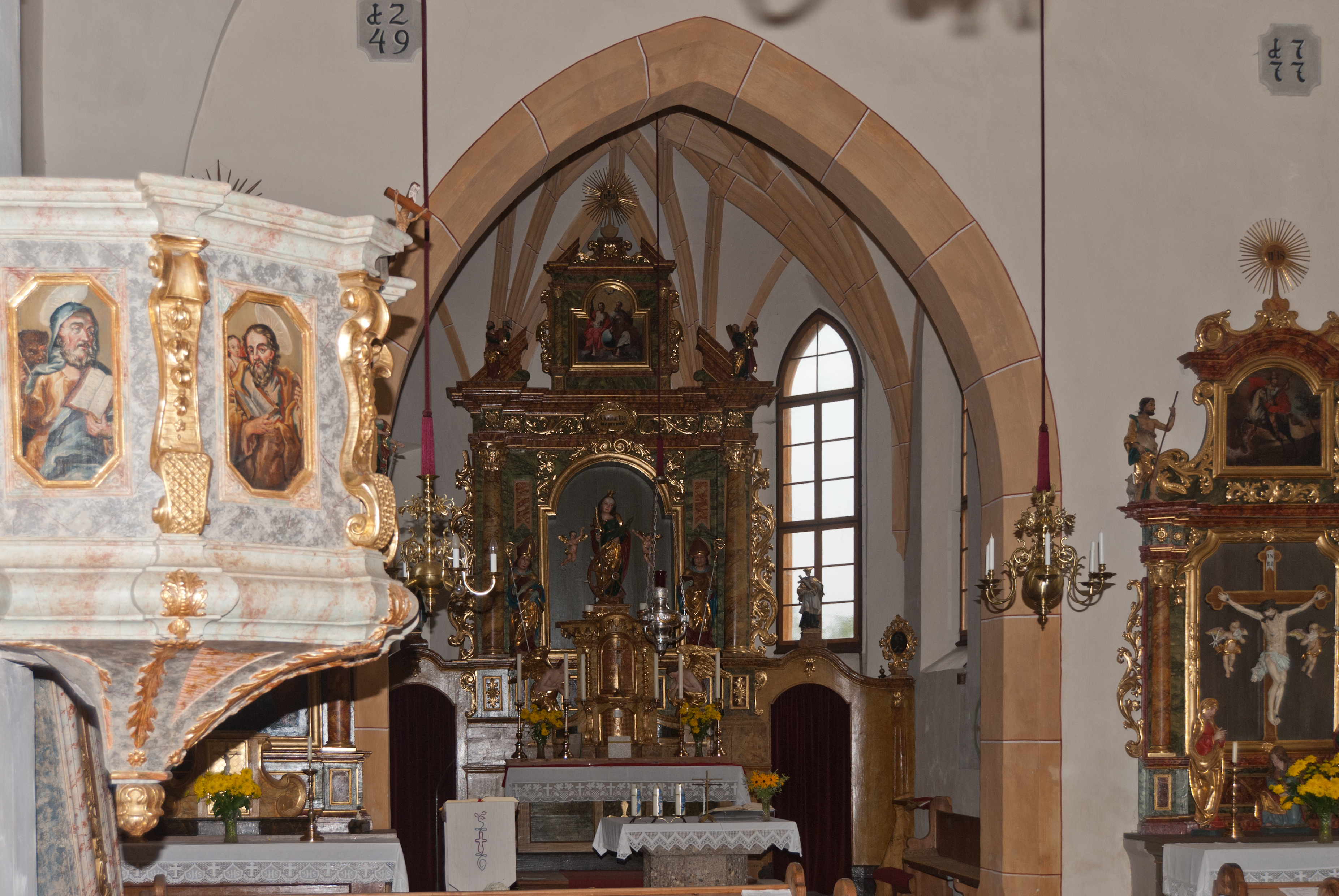 Kath. Pfarrkirche hl. Katharina und Friedhof